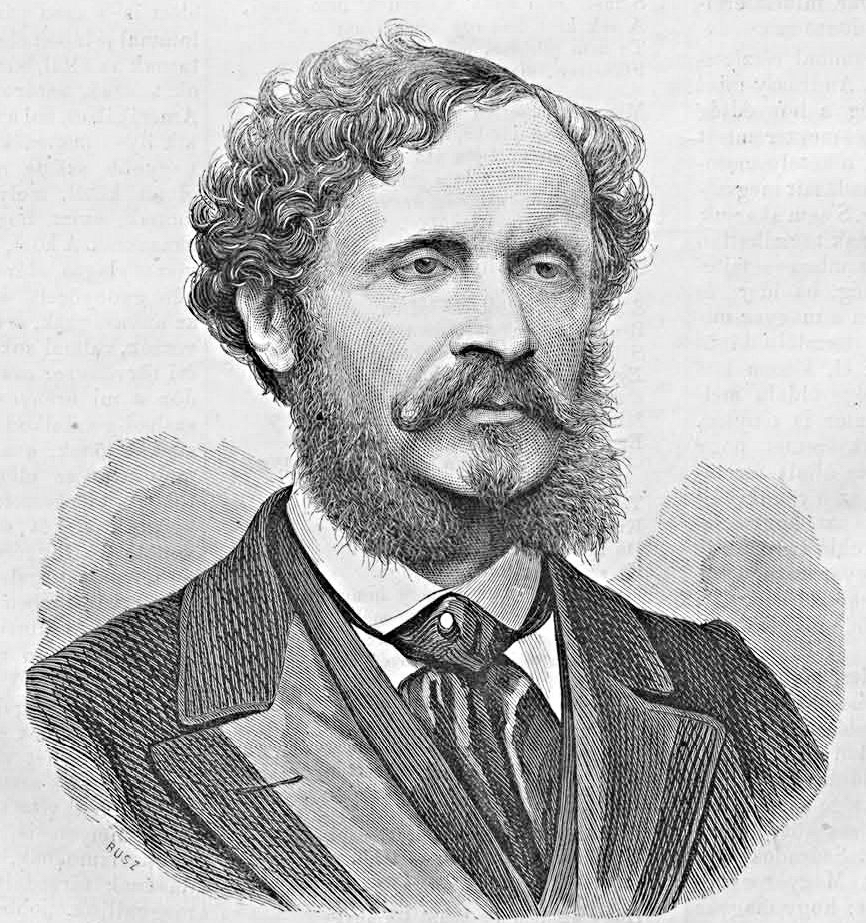 gróf Andrássy Gyula (1823–1891) politikus, miniszterelnök. Rusz Károly metszete (Vasárnapi Ujság, 1871.november 19.)